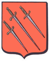 Wapen Sint-Andries